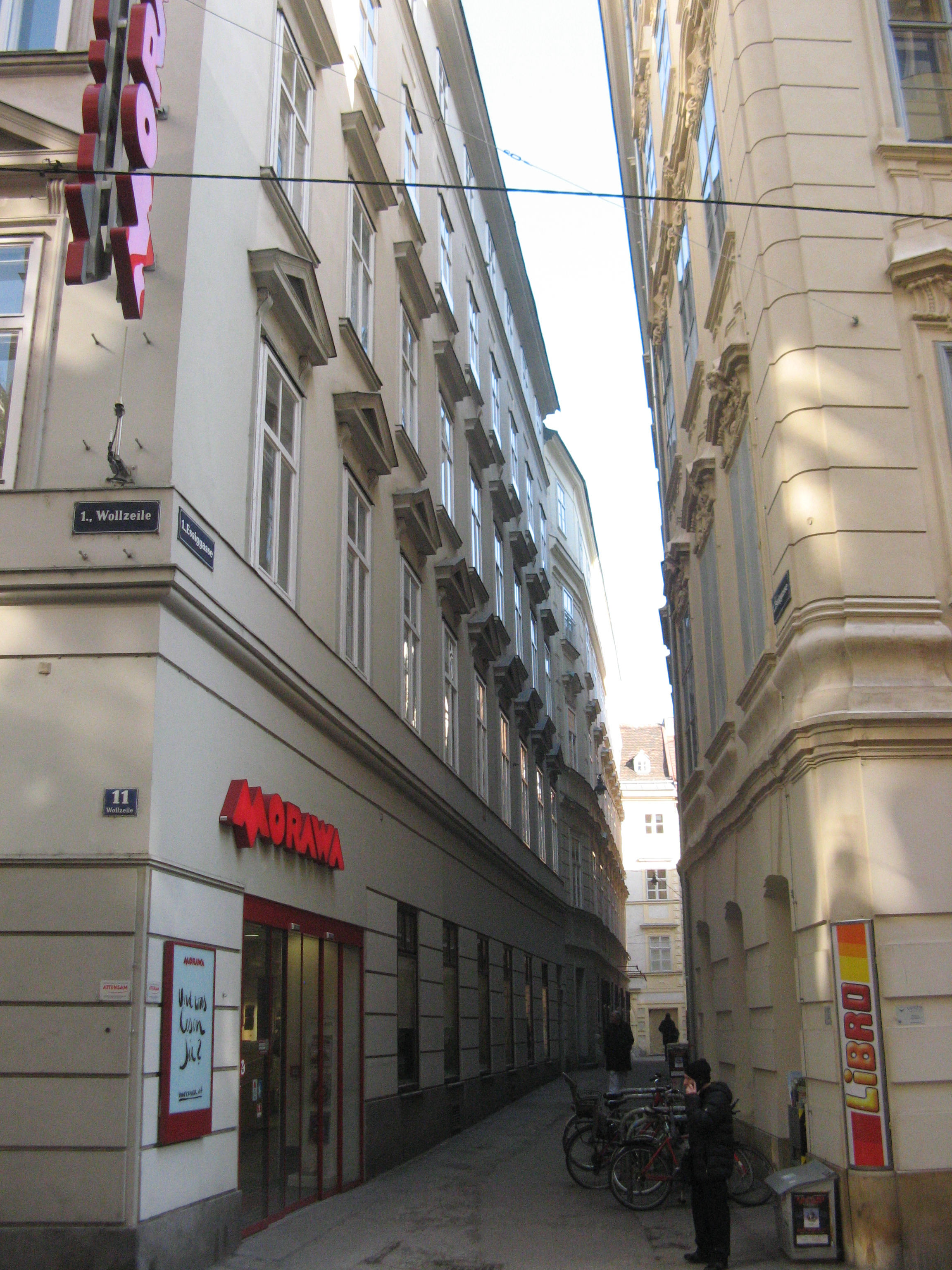 Essiggasse von der Wollzeile aus nach Norden, Wien-Innere Stadt